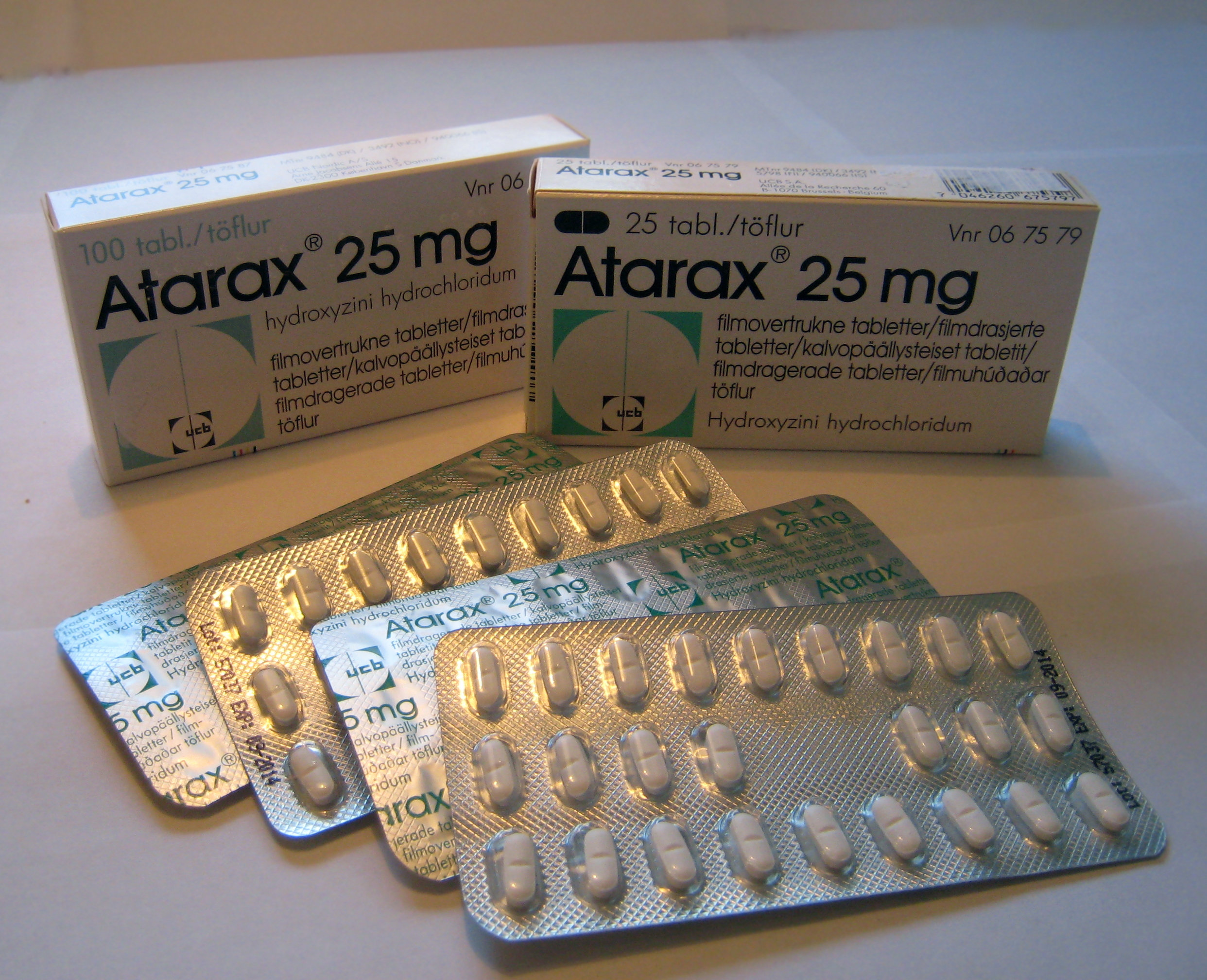 Atarax-lääkkeen myyntipakkauksia